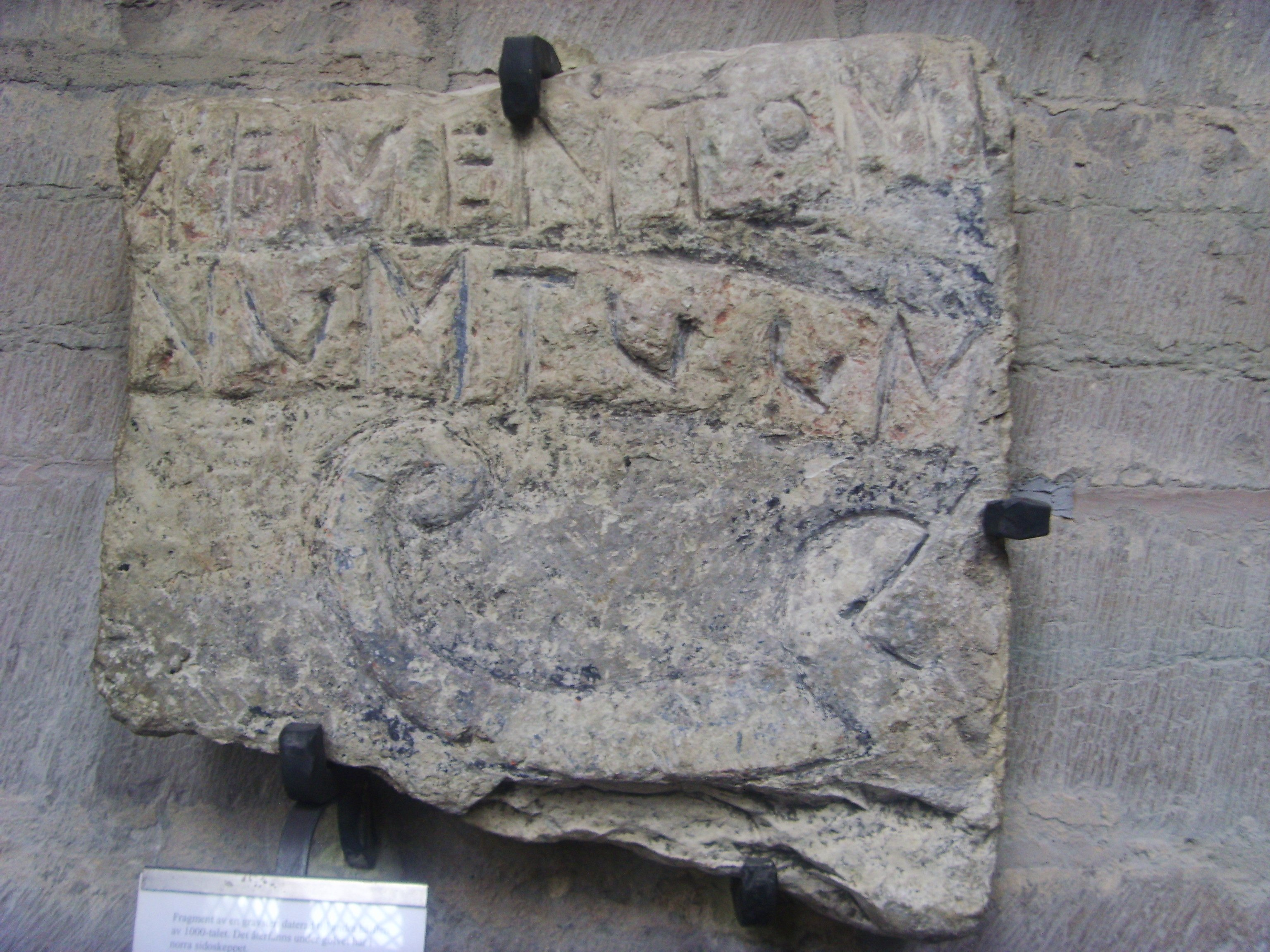 Fragment av en gravsten daterad till andra hälften av 1000-talet. Det återfanns under golvet i Linköpings domkyrkas norra sidoskepp. På latin står här delvis de ord som en av rövarna på Golgata sa till Jesus: Memento me cum veneris in regnum tunum (Herre, kom ihåg mig då du kommer i ditt rike). Det sägs vara den äldsta kända bibelinskriptionen i Sverige.